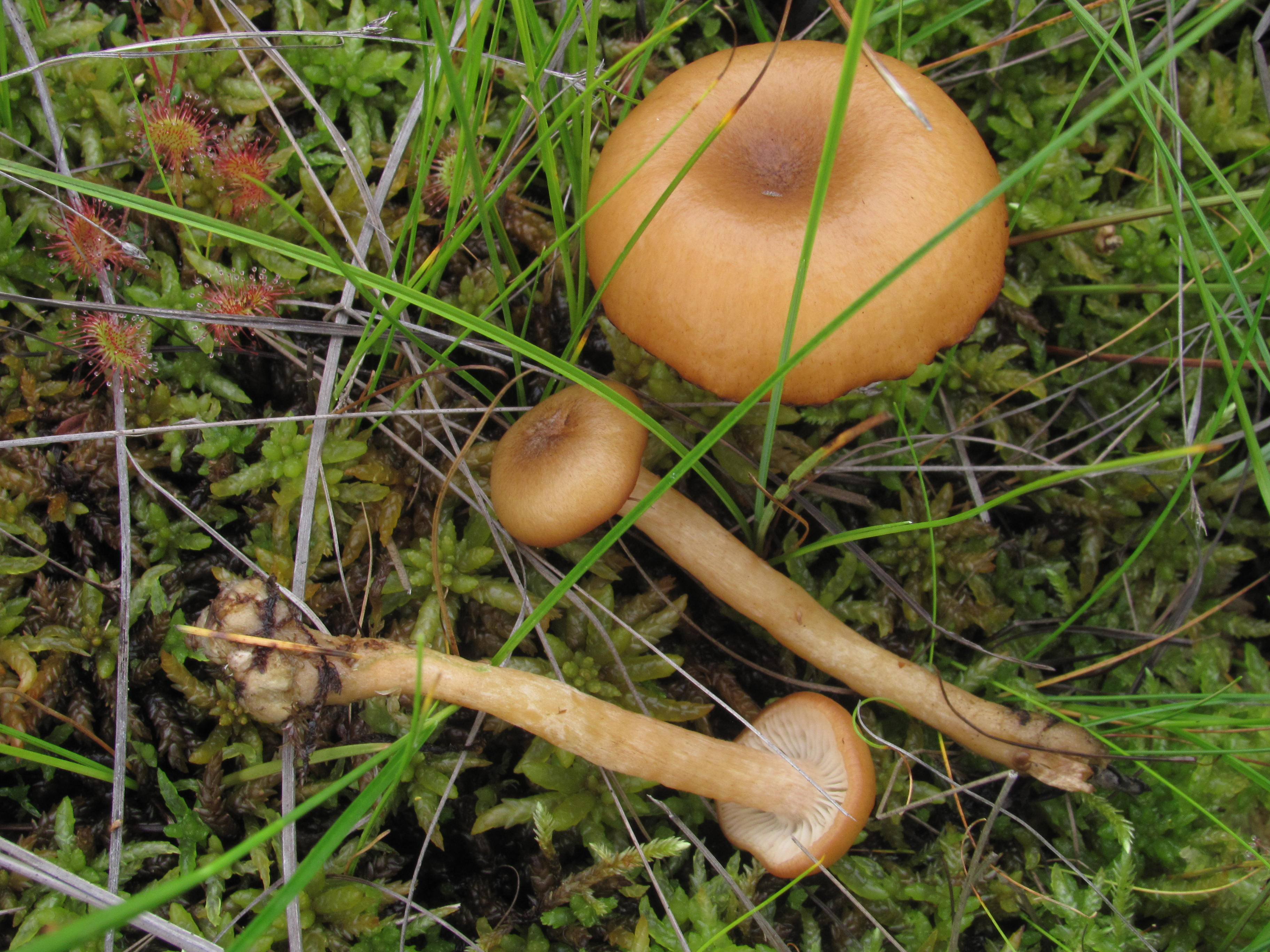 Vesi-külmaseen Läänemaa Suursoos